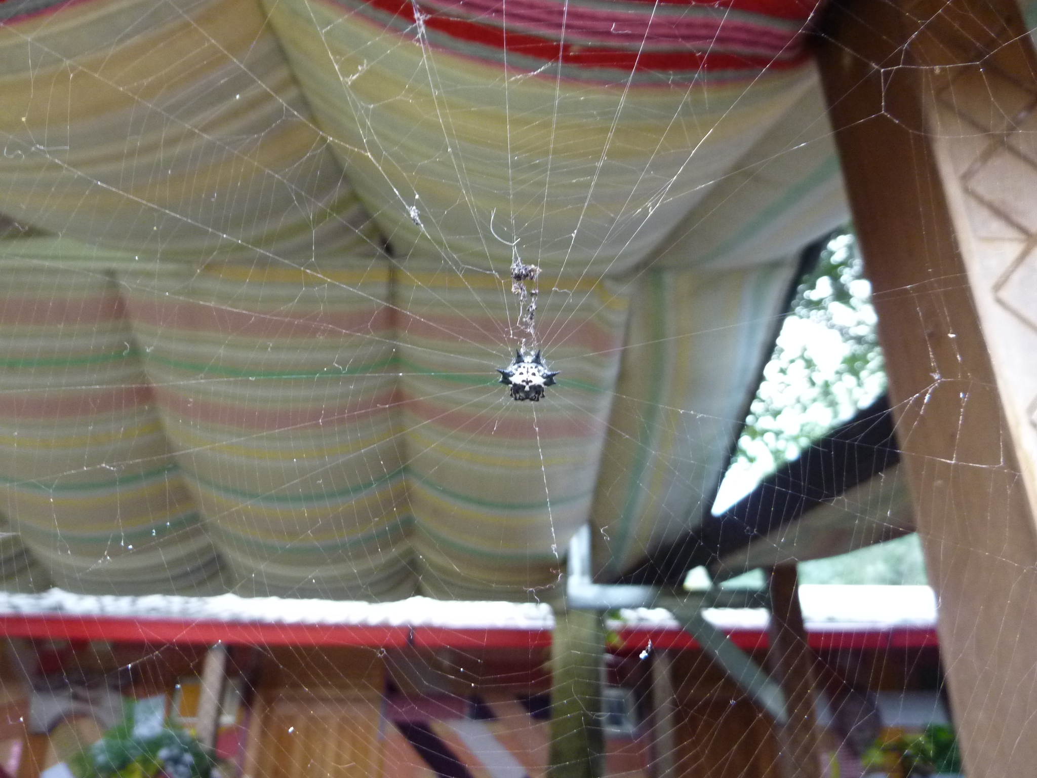 自己拍攝